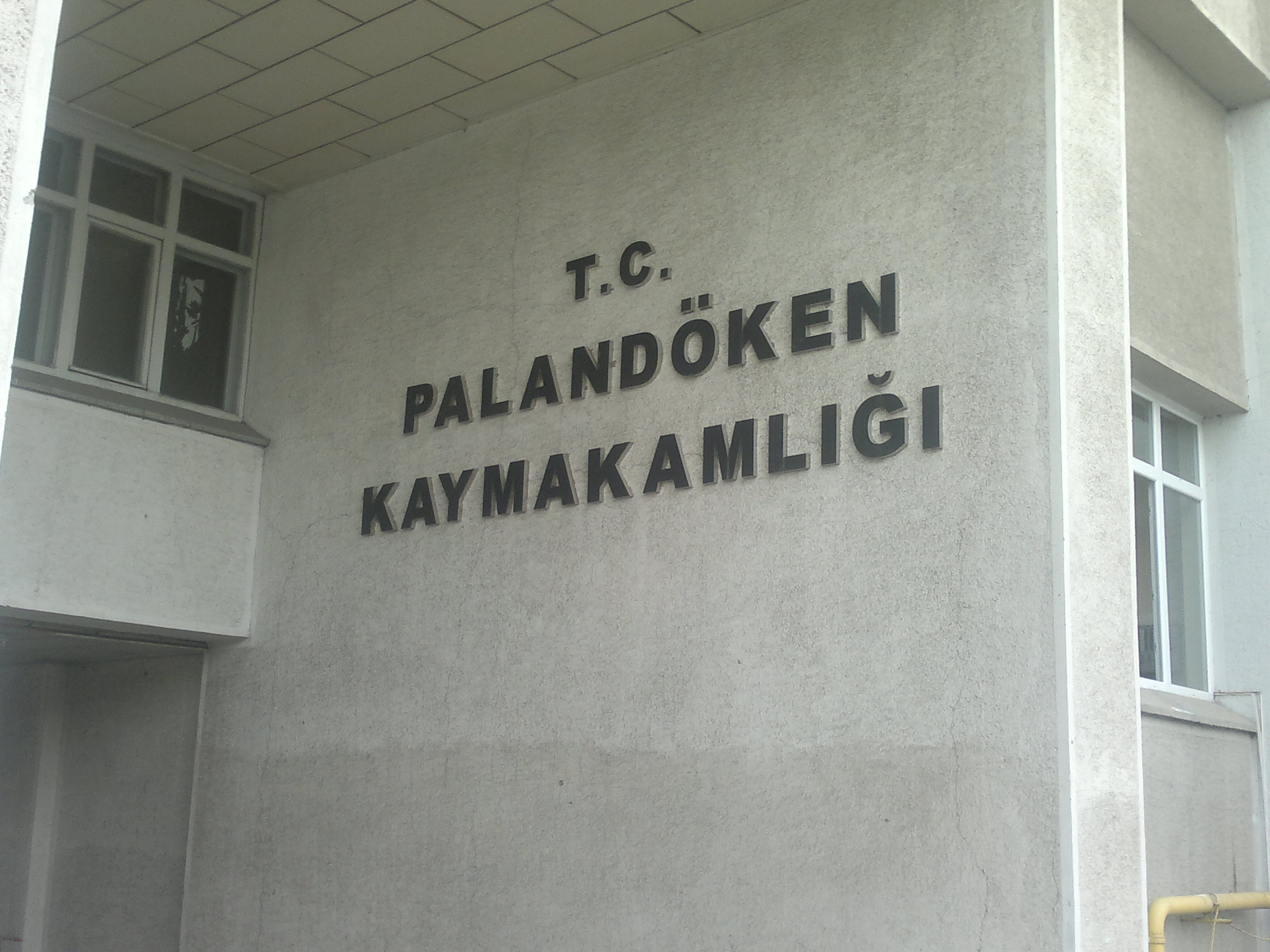 Erzurum Palandöken Kaymakamlığı.